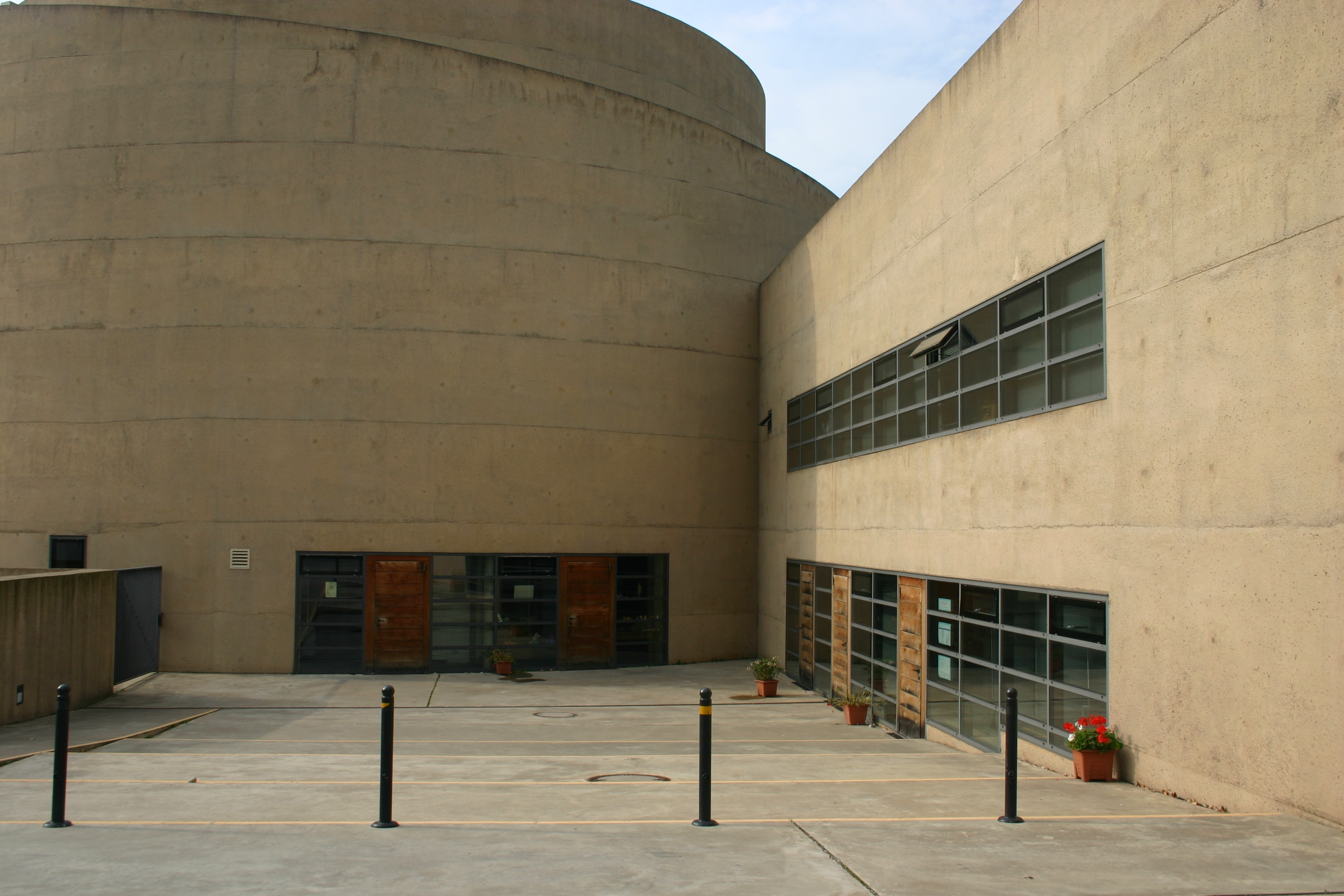 Pfarrkirche St. Theodor, Köln, Rückseite